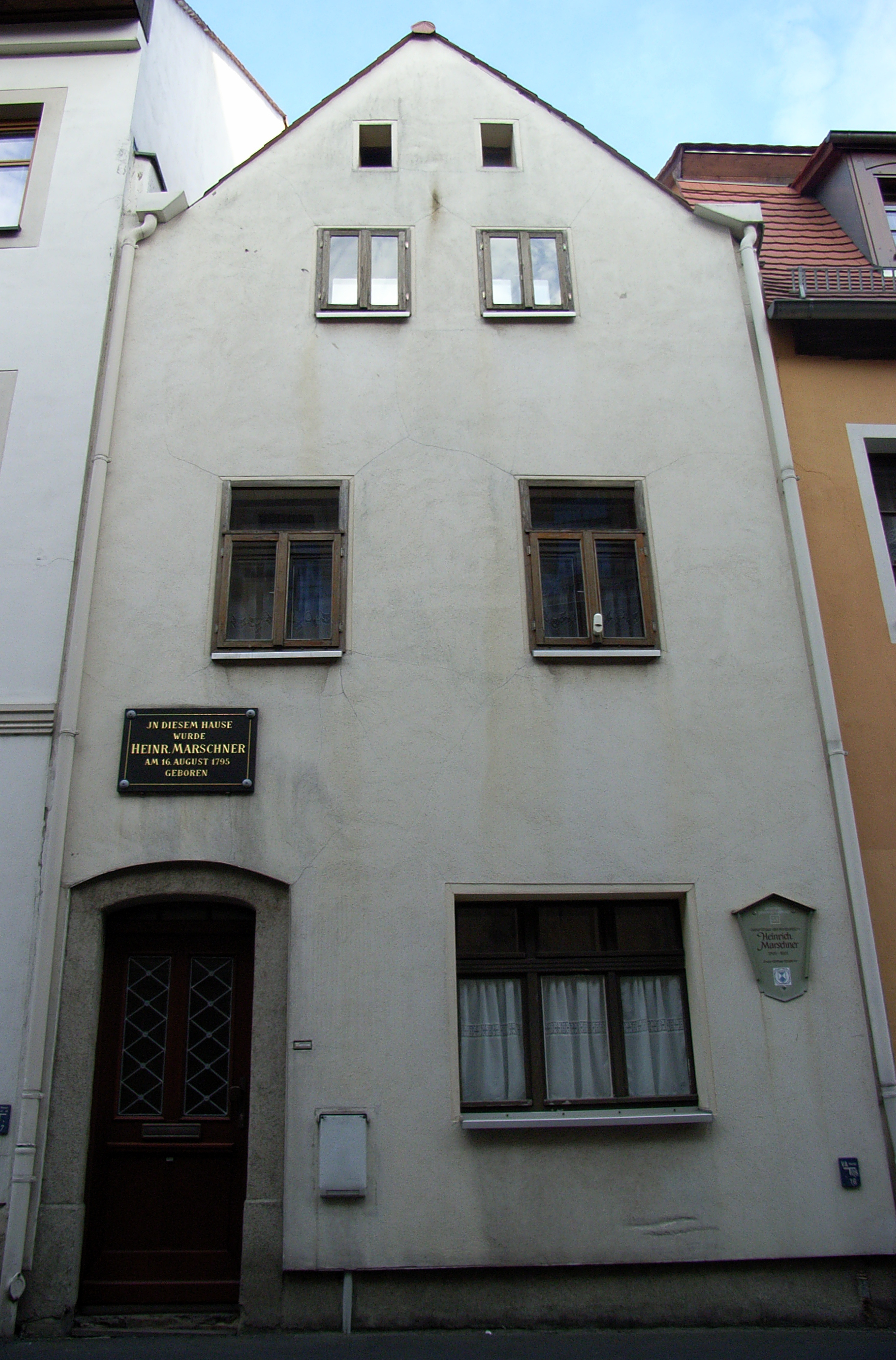 Geburtshaus des Komponisten Heinrich Marschner in Zittau.